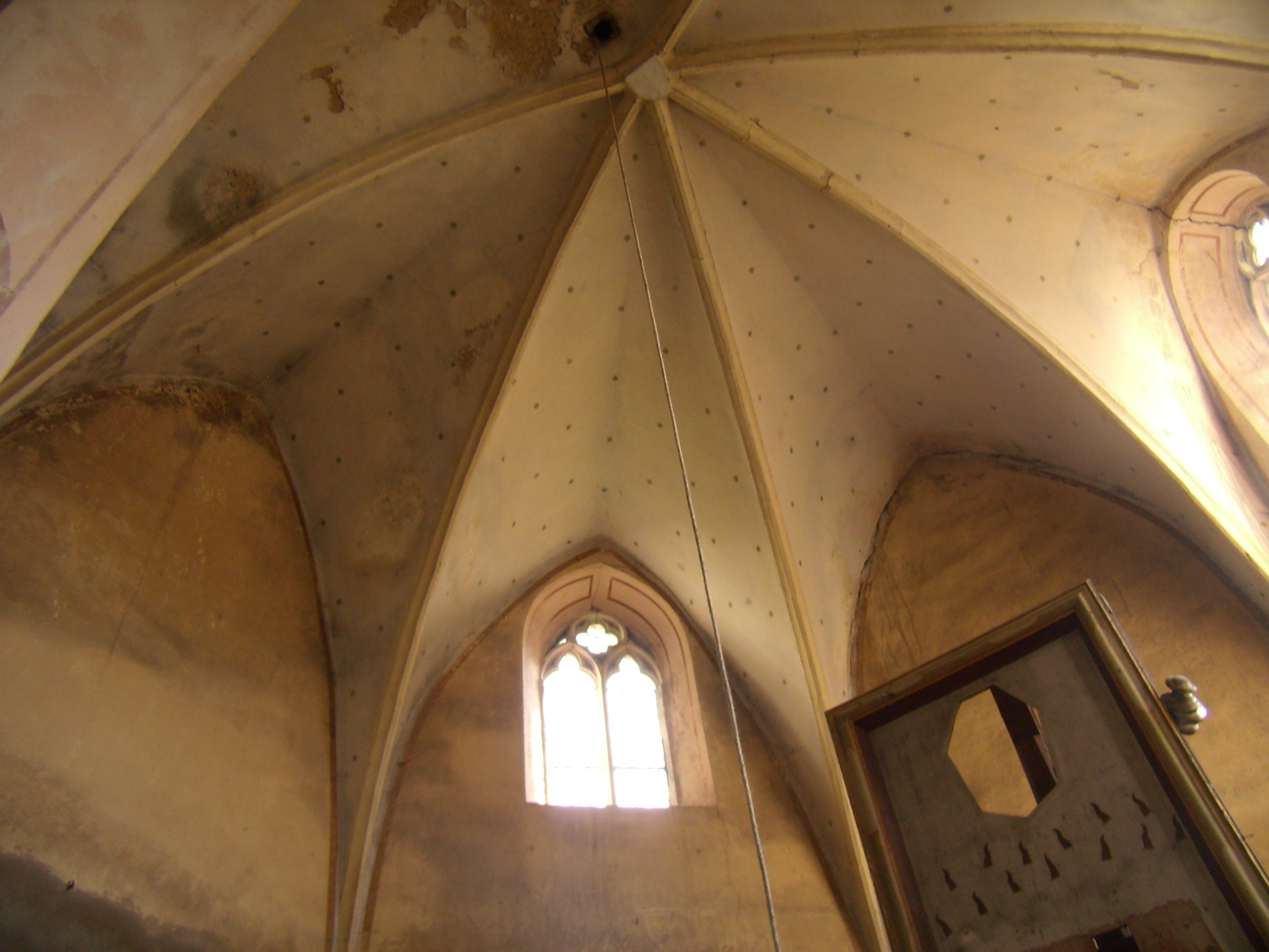 Kostel sv. Ducha (Krupka)-paprsčitá klenba